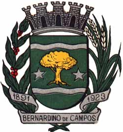 Brasão de Bernardino de Campos